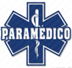 ESTRELLA DE LA VIDA